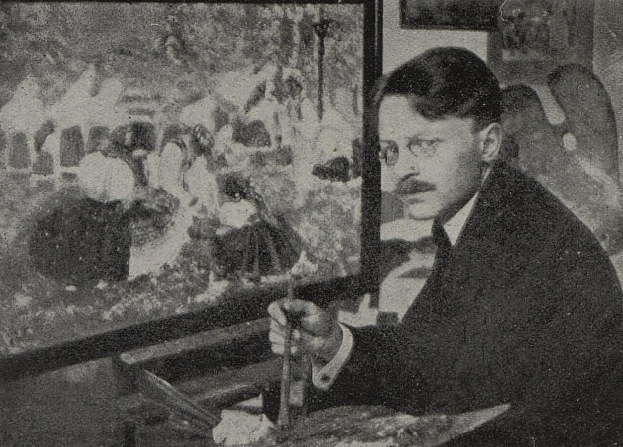 Otto Molitor (1889-1965), český malíř, sochař, grafik a kněz Církve československé husitské